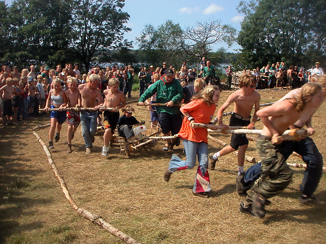 Bilden föreställer SMU-scouter som tävlar med foror (vagnar) som de surrat ihop av slanor och sågade hjul vid ett läger vid sjön Immeln i Skåne.